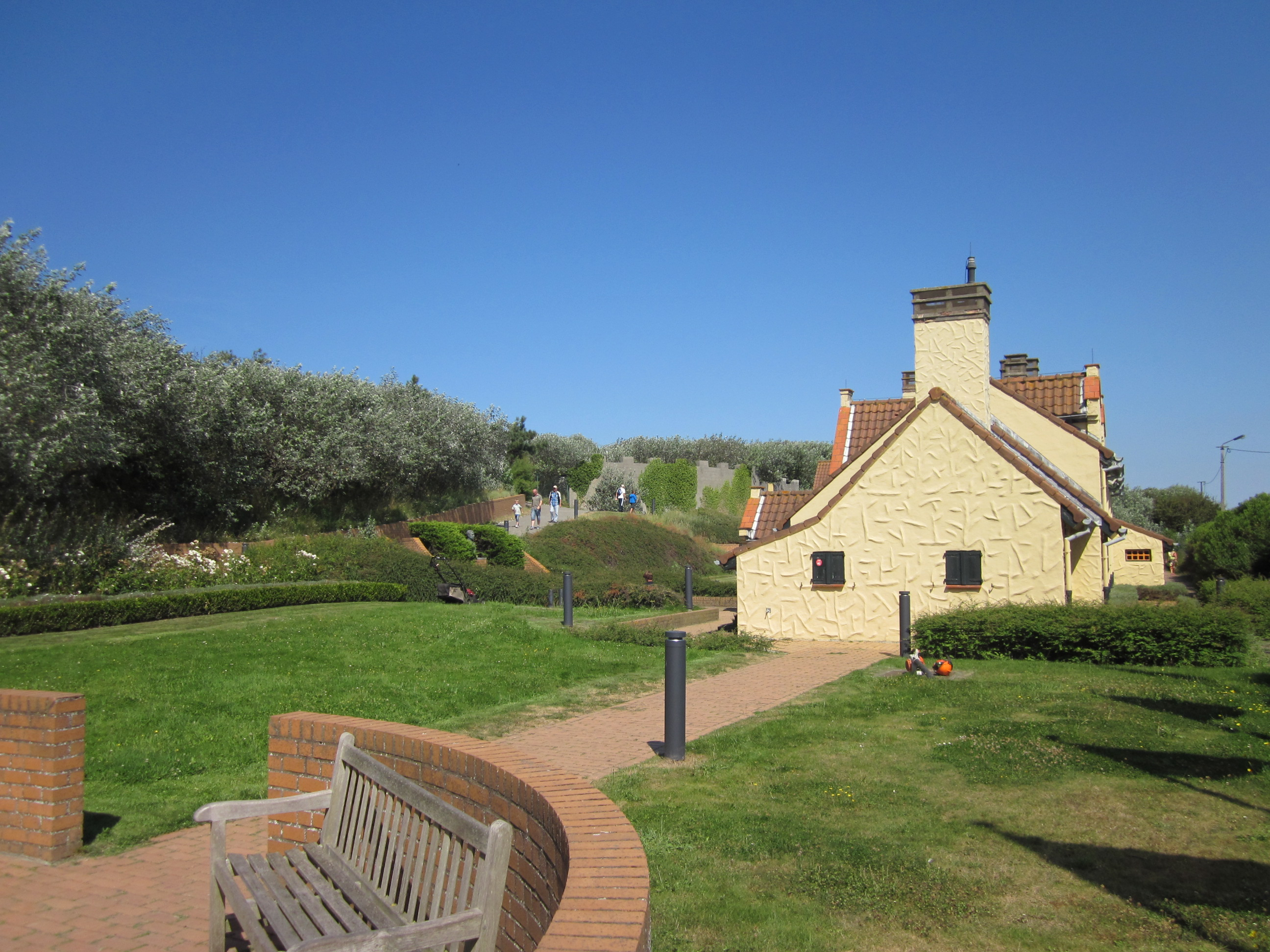 Memoriaal Prins Karel, Domein Raversijde